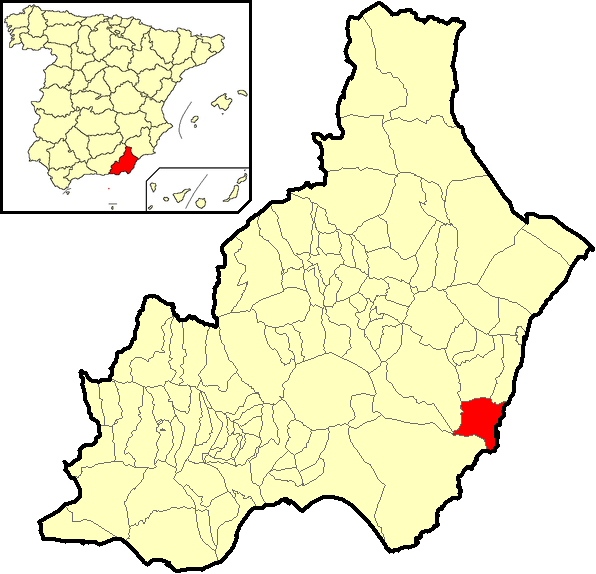 Situación del término municipal de Carboneras respecto a la provincia de Almería, en España.